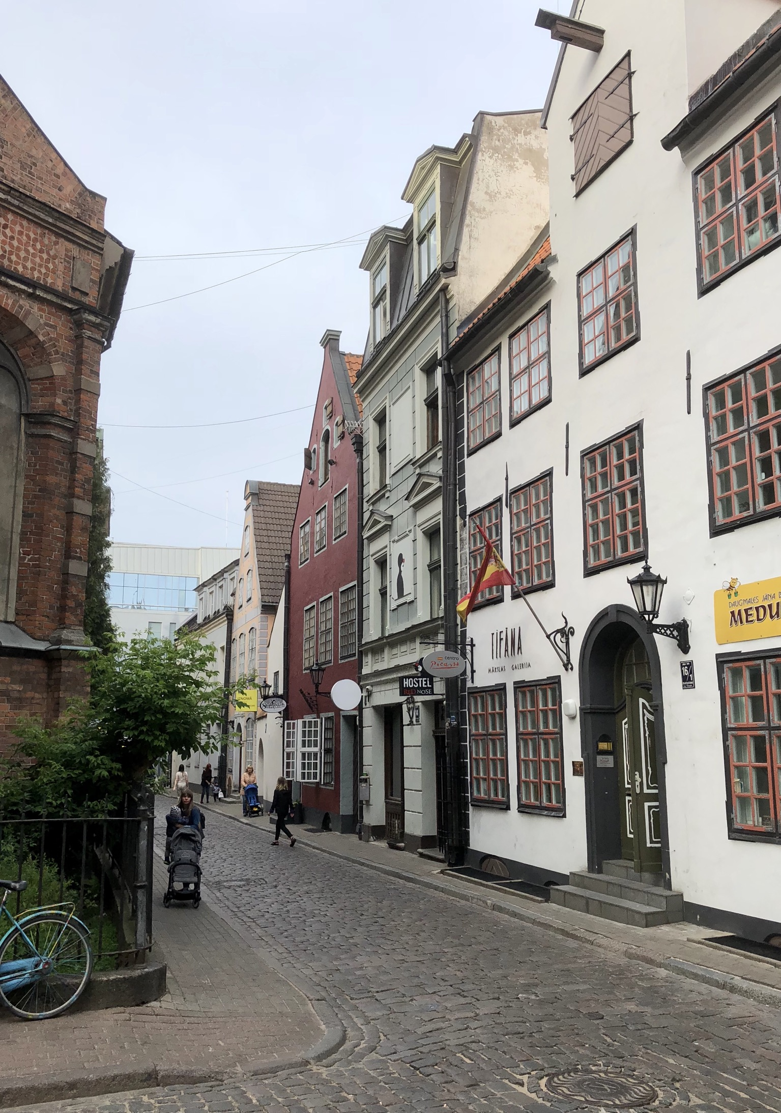 Johannisstraße in Rigs